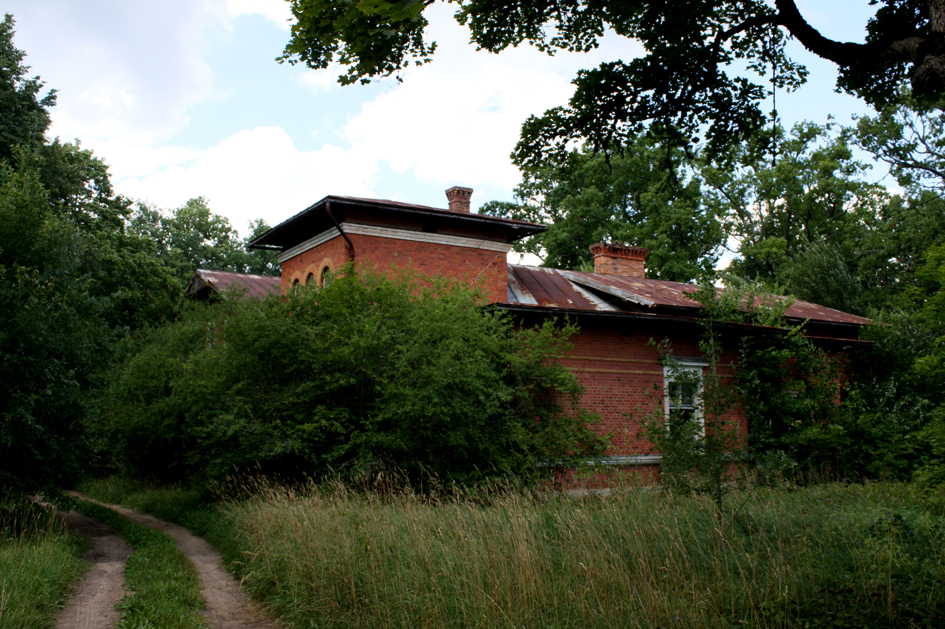 Rantsna mõisa peahoone